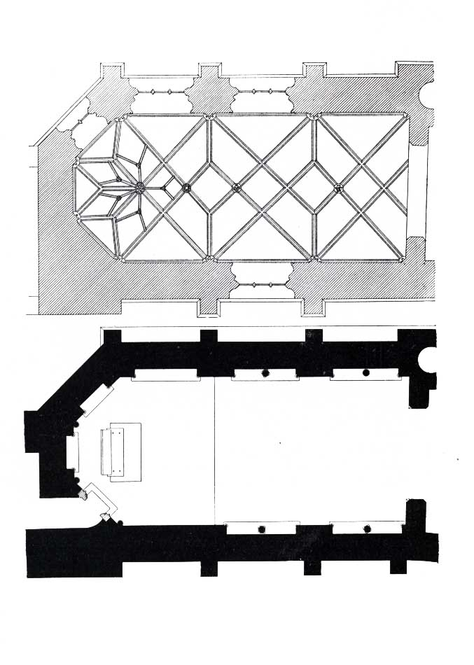 klenba a půdorys